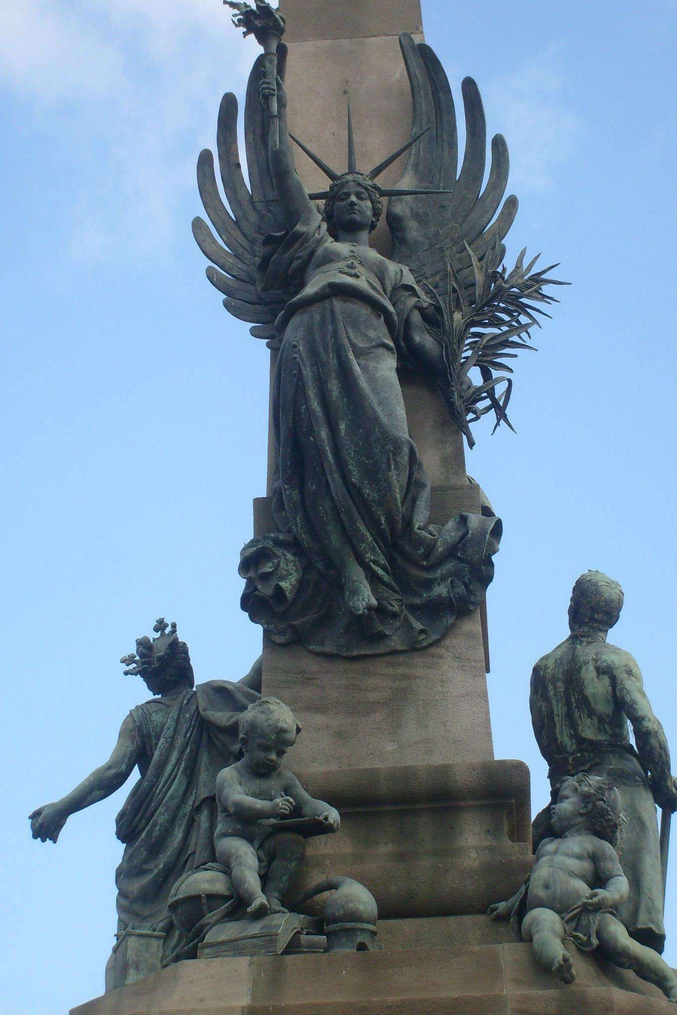 A Francesc Rius i Taulet (Manel Fuxà). Pg. de Lluís Companys, abans Saló de Sant Joan (Barcelona)